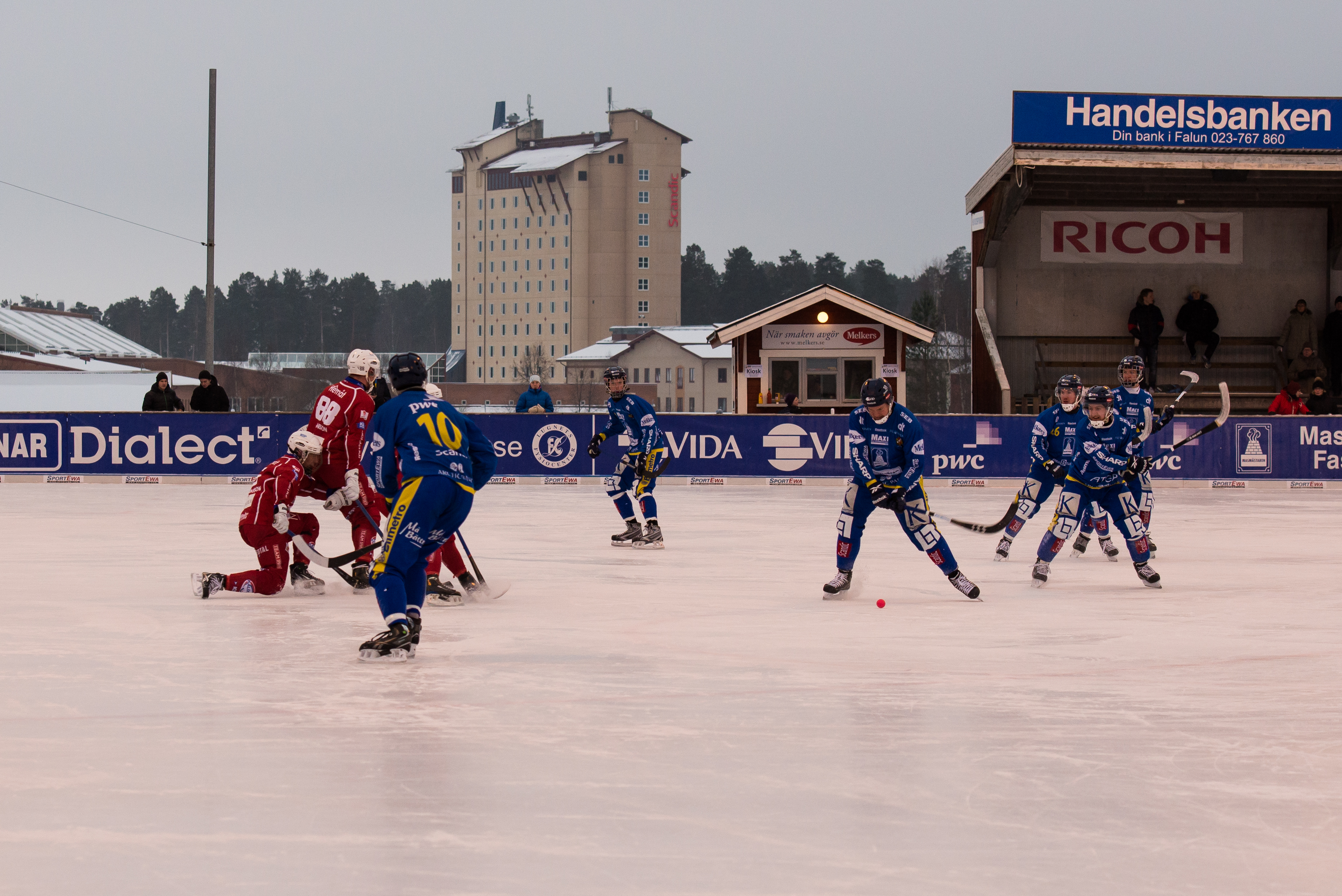 Allsvenskan i Bandy 2012/2013, på Lugnets isstadion. Falu BS i blått mot Kalix Bandy i rött. Hörna för Falun.